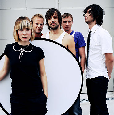 Mia., Bildproduktion für das Musikmagazin "Melodie und Rhythmus"